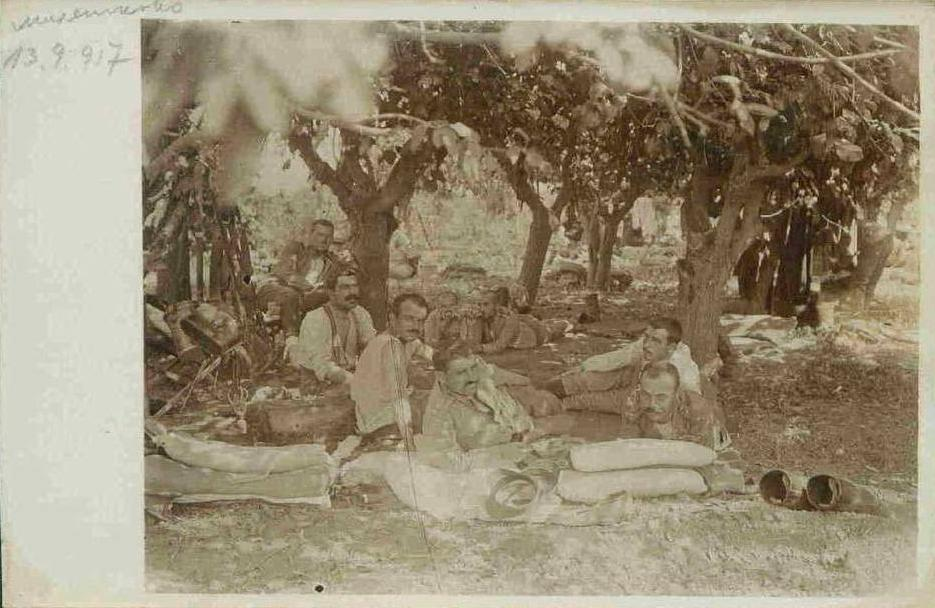 Български войници в Милетково през Първата световна война